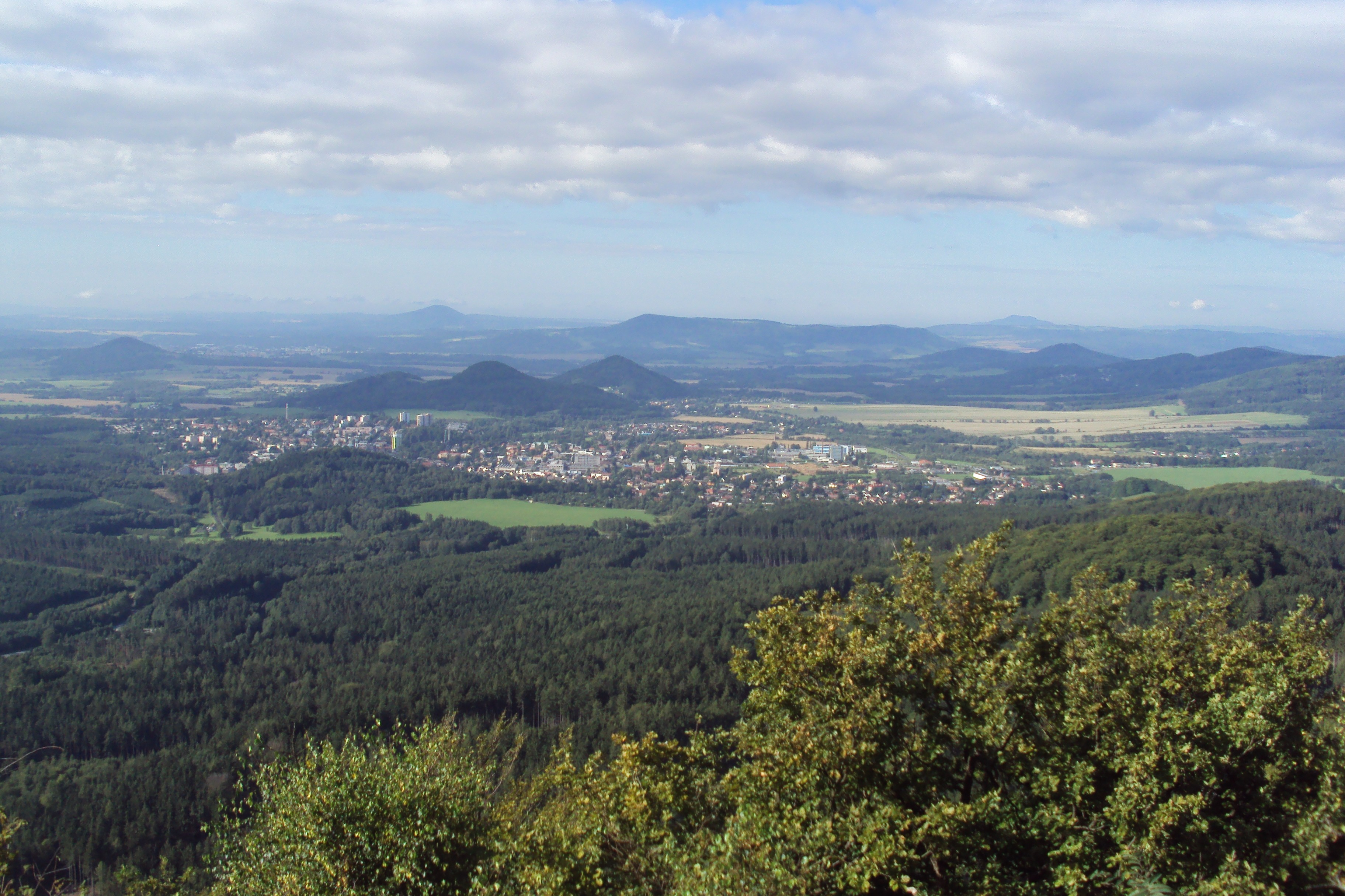 Výhled z vrcholu Klíče na Nový Bor, vzadu i Česká Lípa